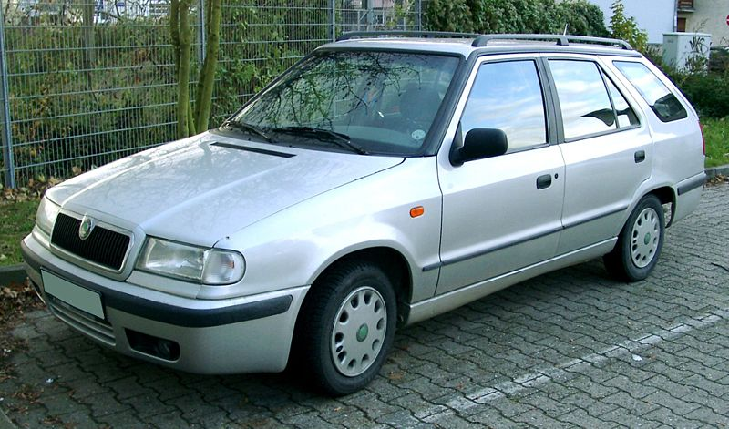 Skoda Felicia kombi